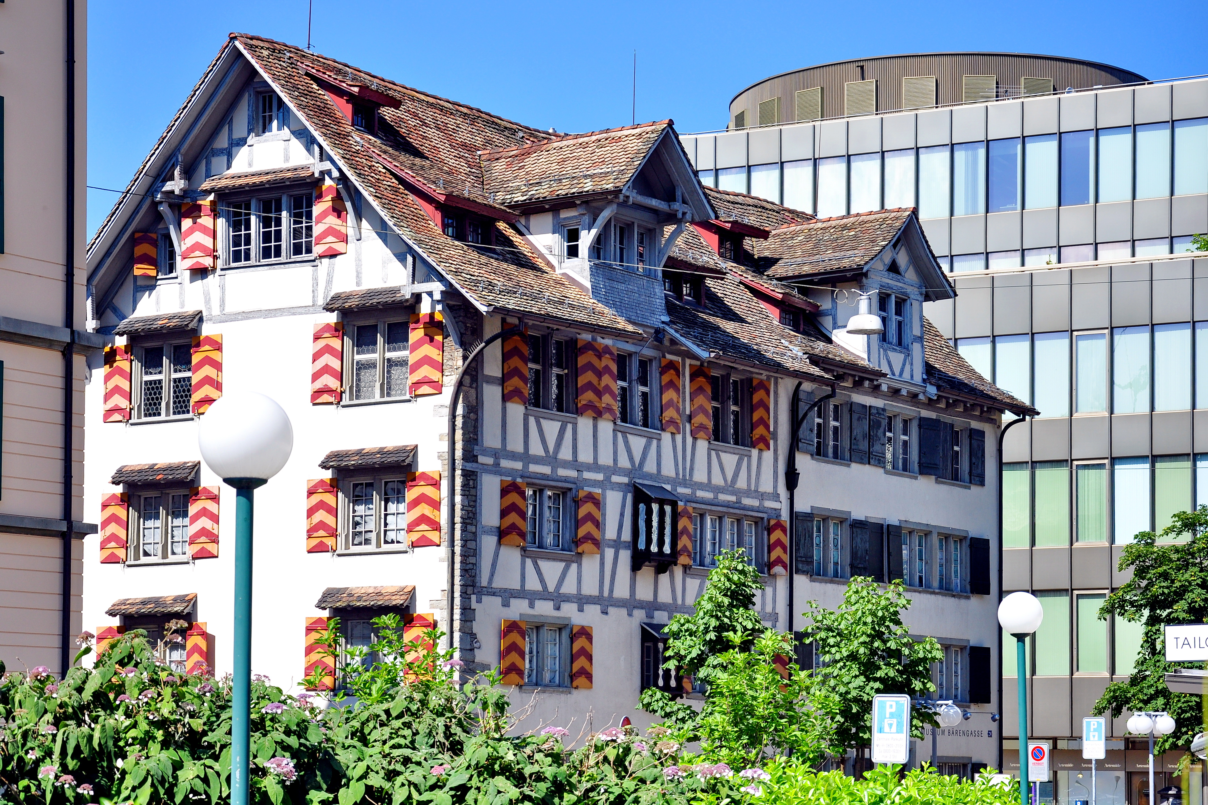 Wohnmuseum Bärengasse in Zürich (Switzerland)